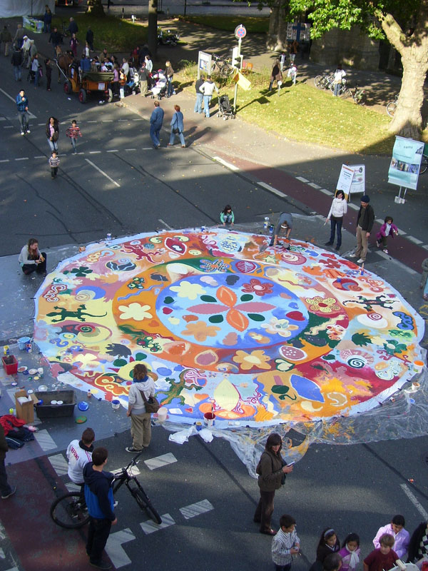 Bemalte Straße bei der Europäischen Mobilitätswoche 2007 in Bielefeld